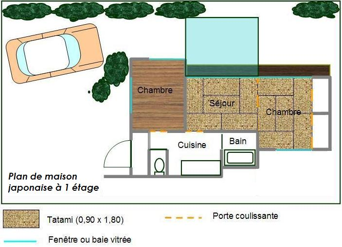 Plan d'une maison japonaise traditionnelle à 1 niveau. On y voit la disposition des tatamis dans les pièces de 6 Dô.